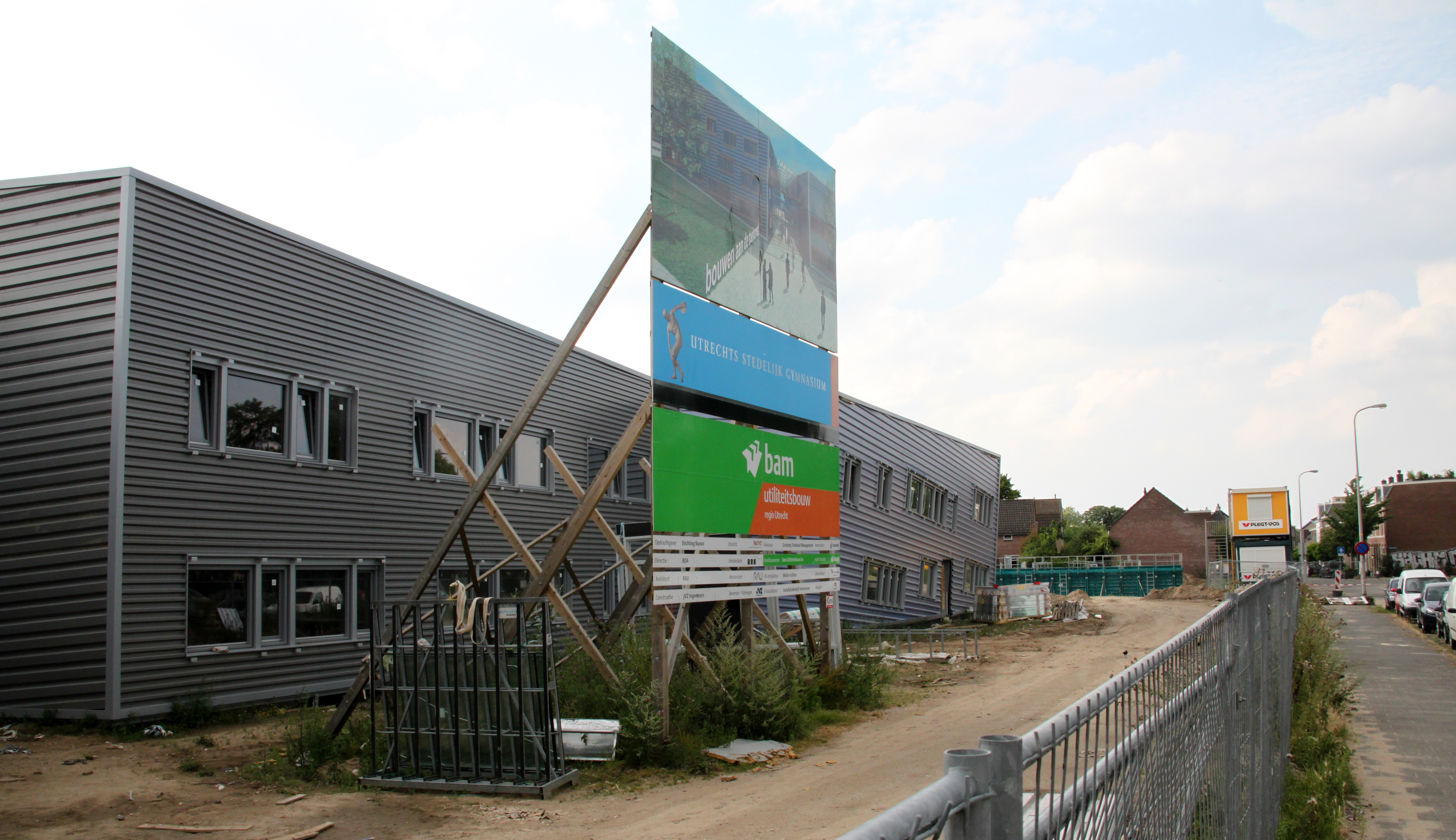 De nieuwe vestiging van het Utrecht Stedelijk Gymnasium aan de Ina Boudier-Bakkerlaan 7 Utrecht (NL)